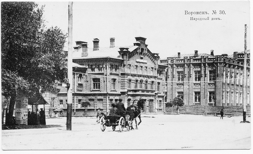 Народный дом